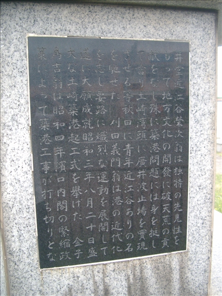 秋田港（土崎港）を拓いた近江谷栄次、刈田義門、金子為吉の功績を讃える石碑（セリオン近く）